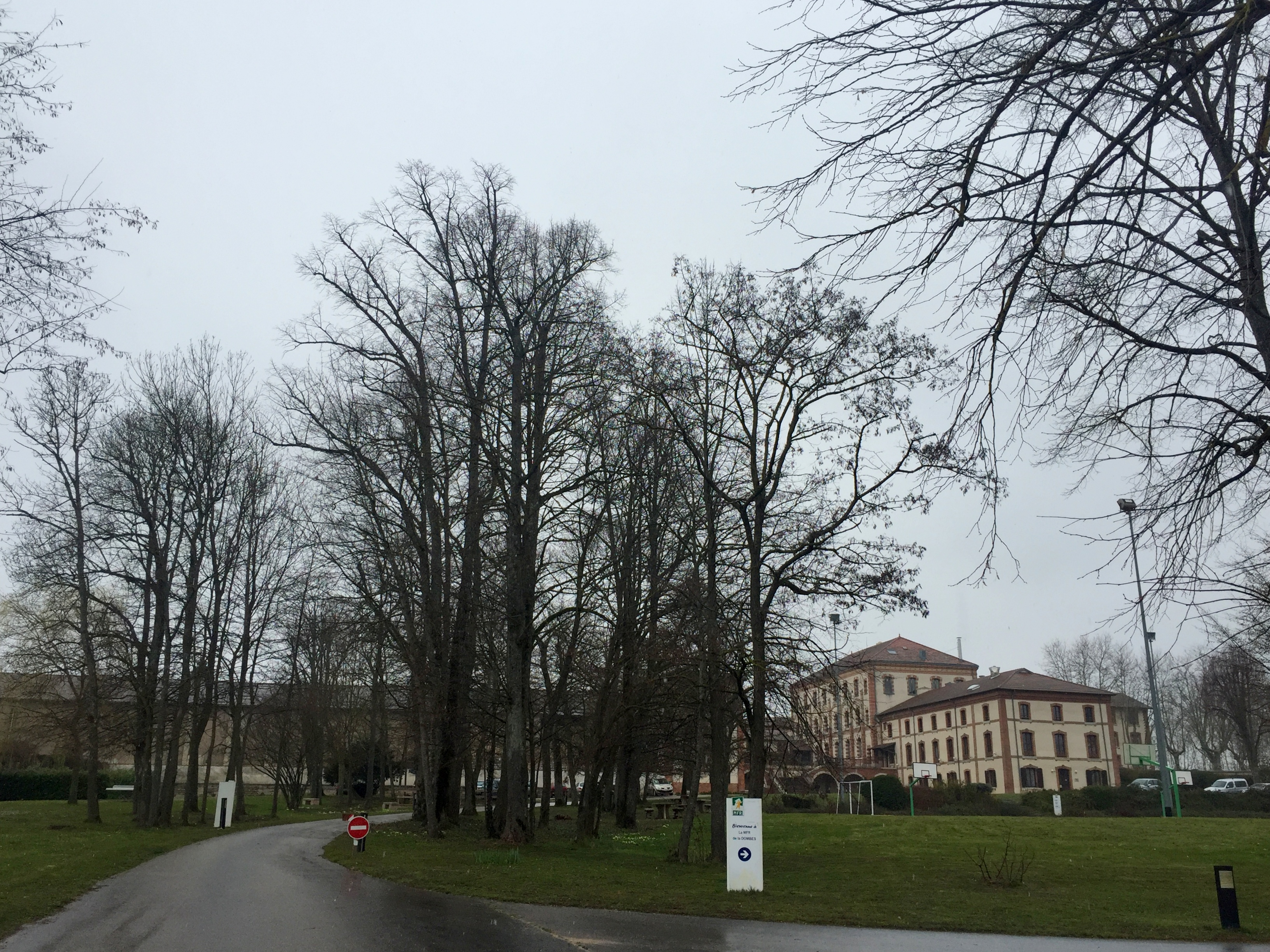 Image de Montluel, Ain, France..